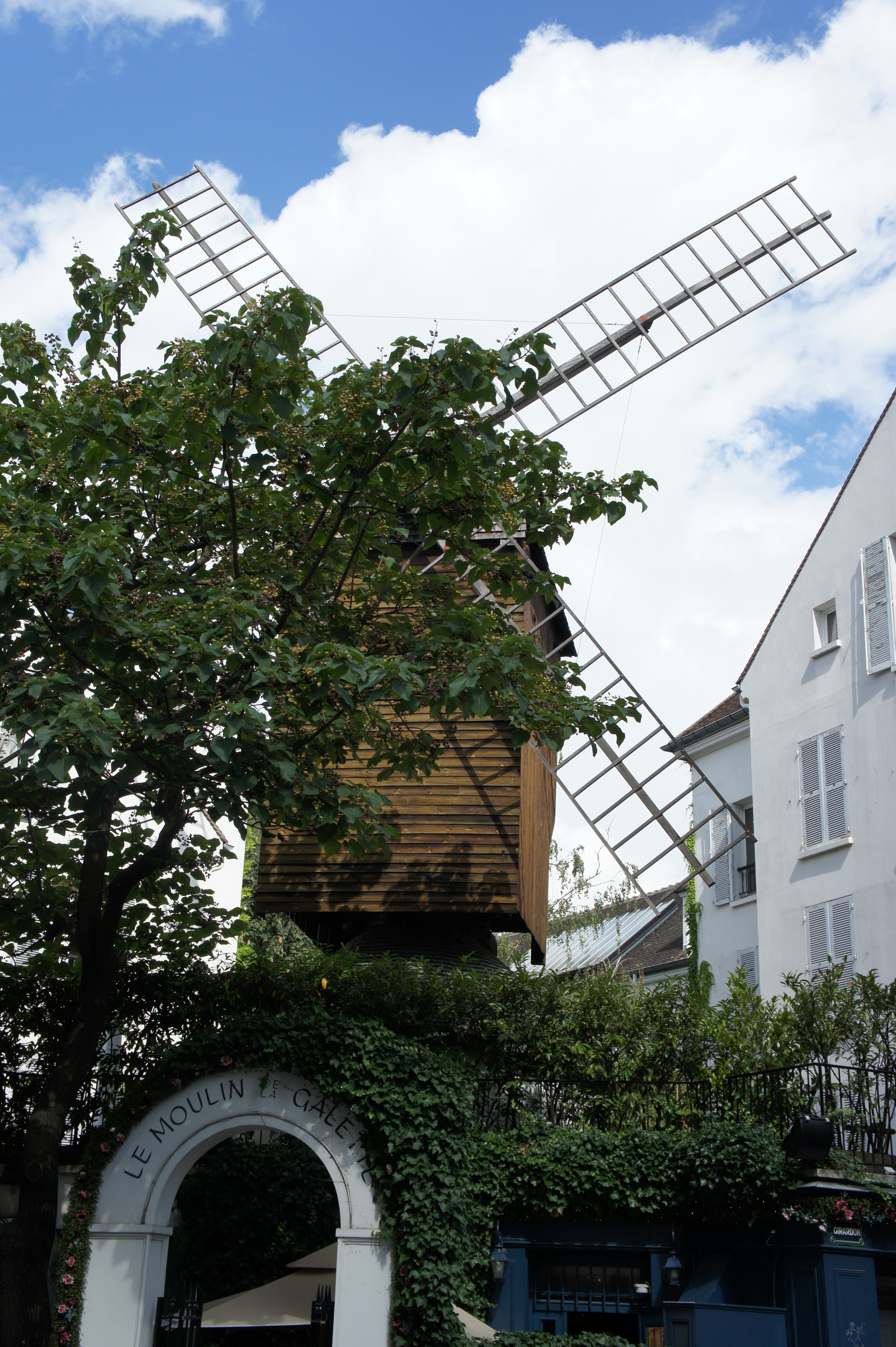 Le Moulin de la Galette, Montmartre, Paris